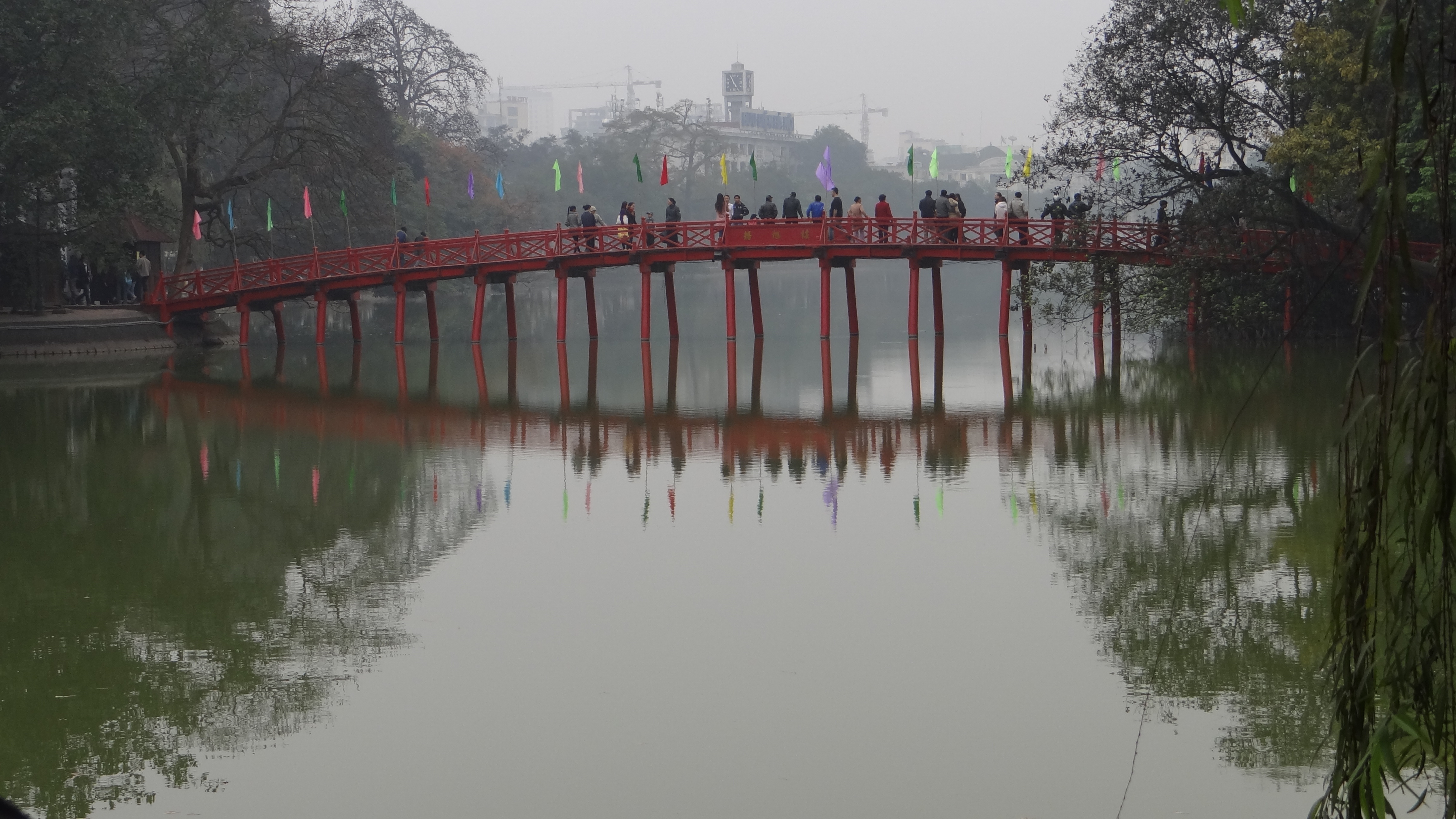 Vietnam - Ha Noï - lac Hô Hoàn Kiêm - la légende de l'épée